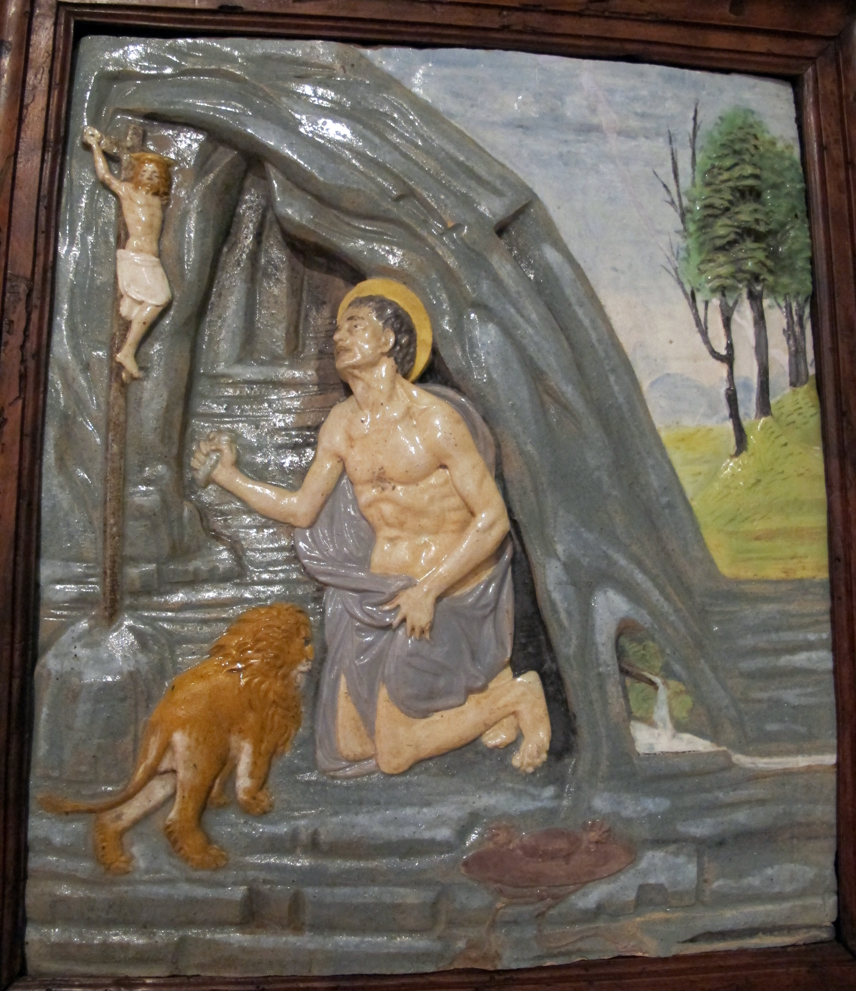 Museo di arte sacra (Montespertoli)